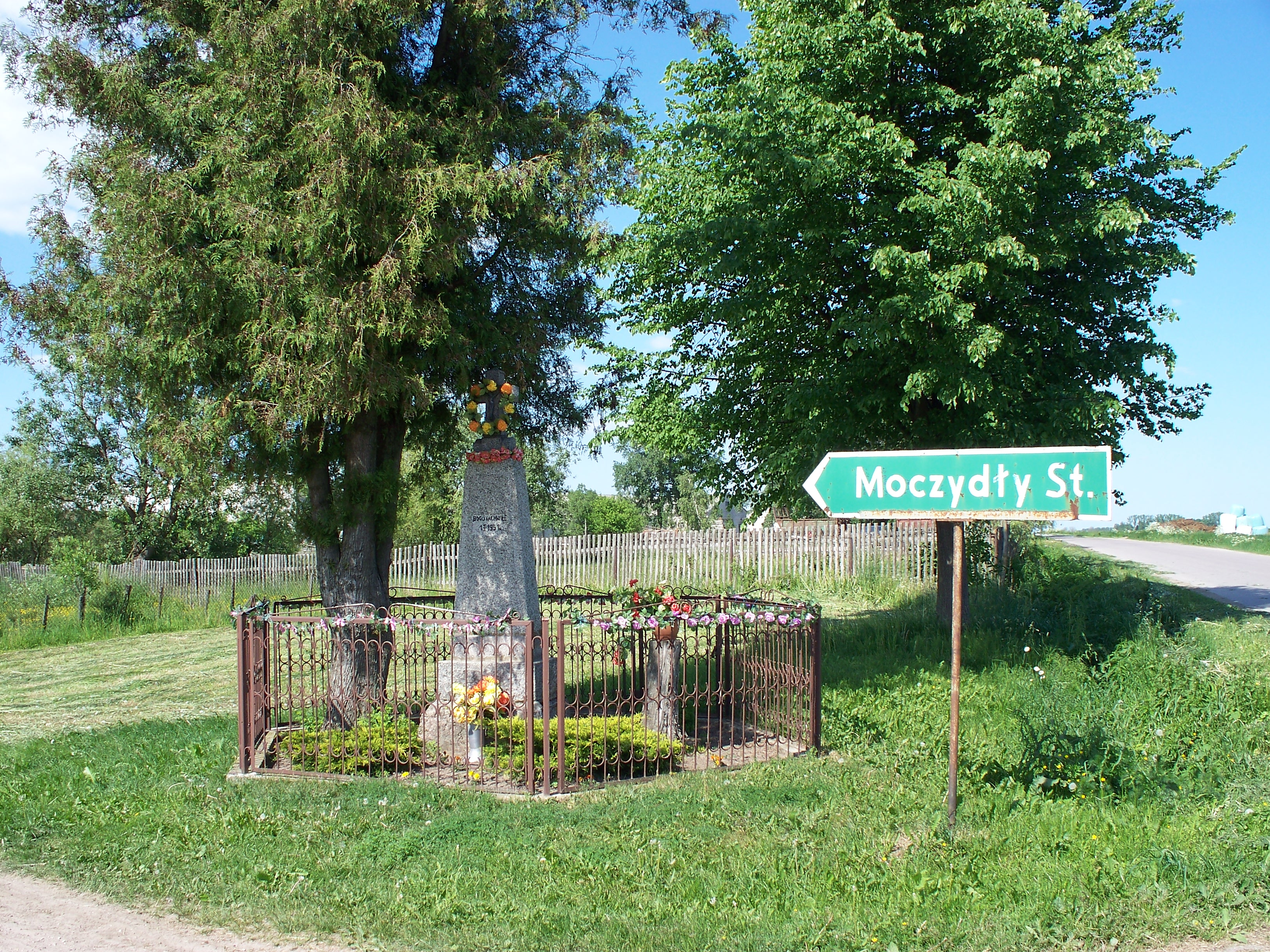 Obok drogowskazu w kształcie strzały znajduje się krzyż przydrożny z datą 1951 r.